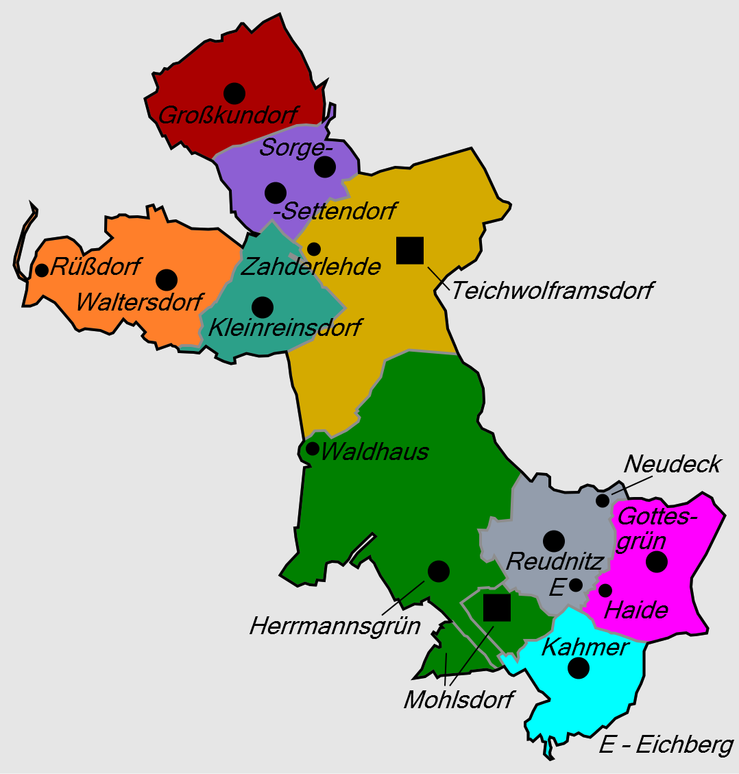 Gliederung der Gemeinde Mohlsdorf-Teichwolframsdorf ab 1. Juli 1958